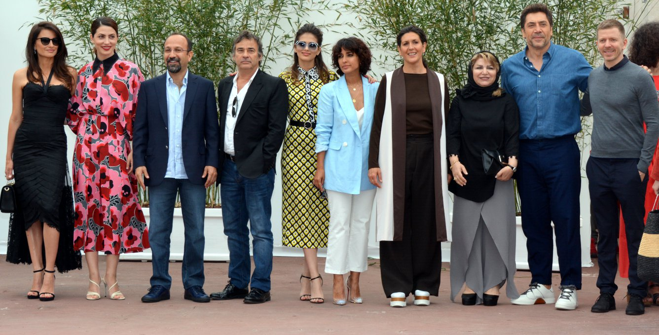 festival de Cannes